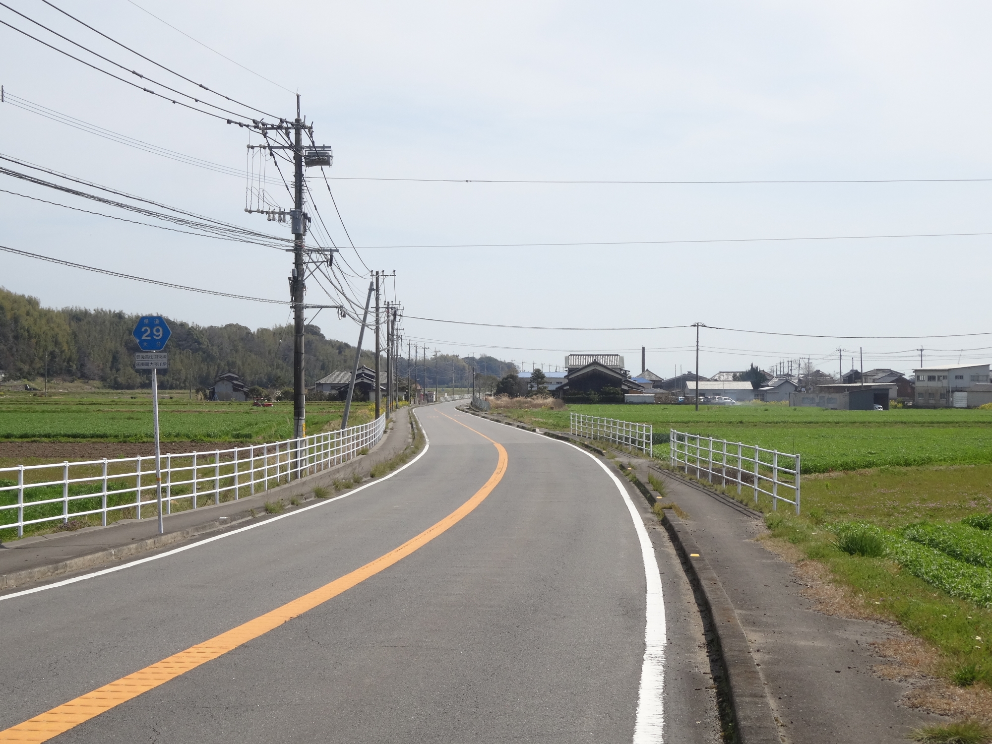 大分県道29号豊後高田国東線（国東市国東町大字川原、水口バス停付近より撮影）